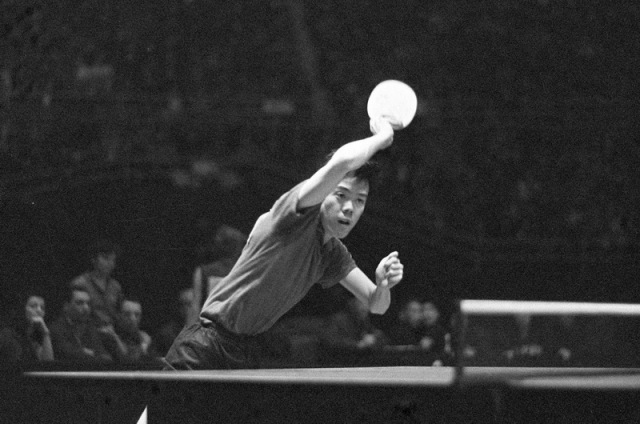 容国团，中国著名乒乓球运动员。